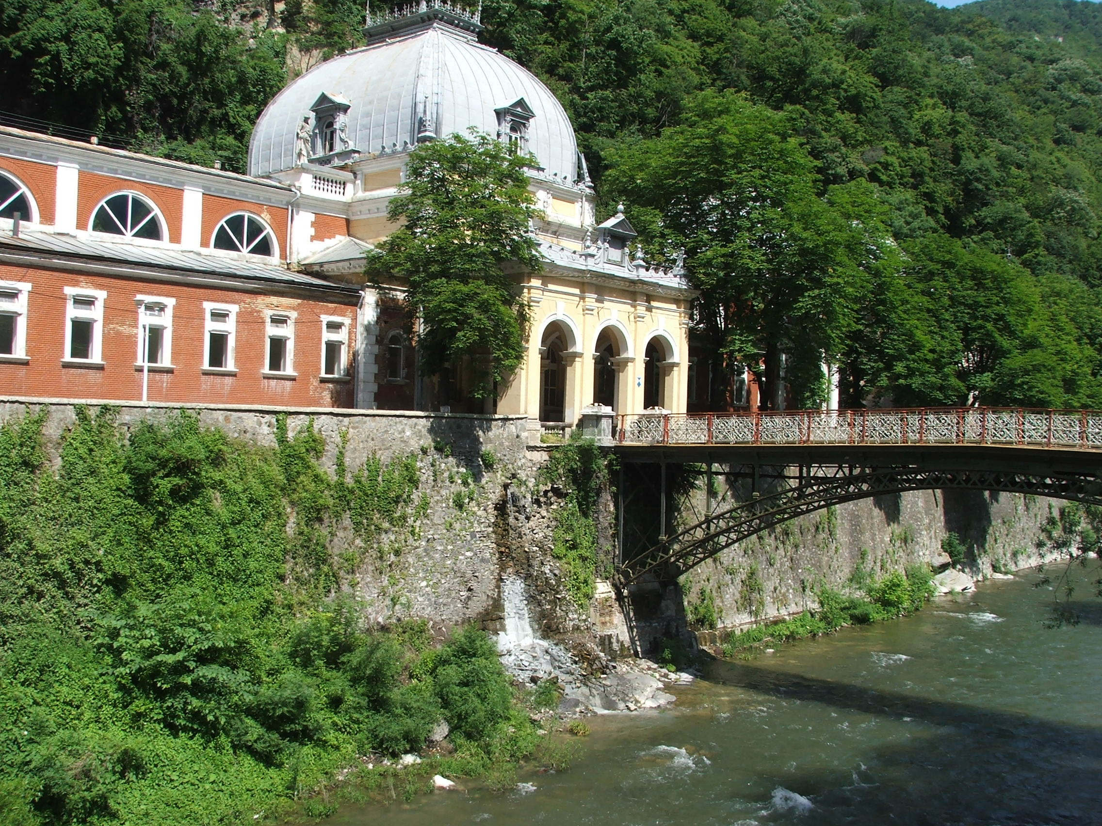 Herkulesfürdő - Băile Herculane Transsylvania